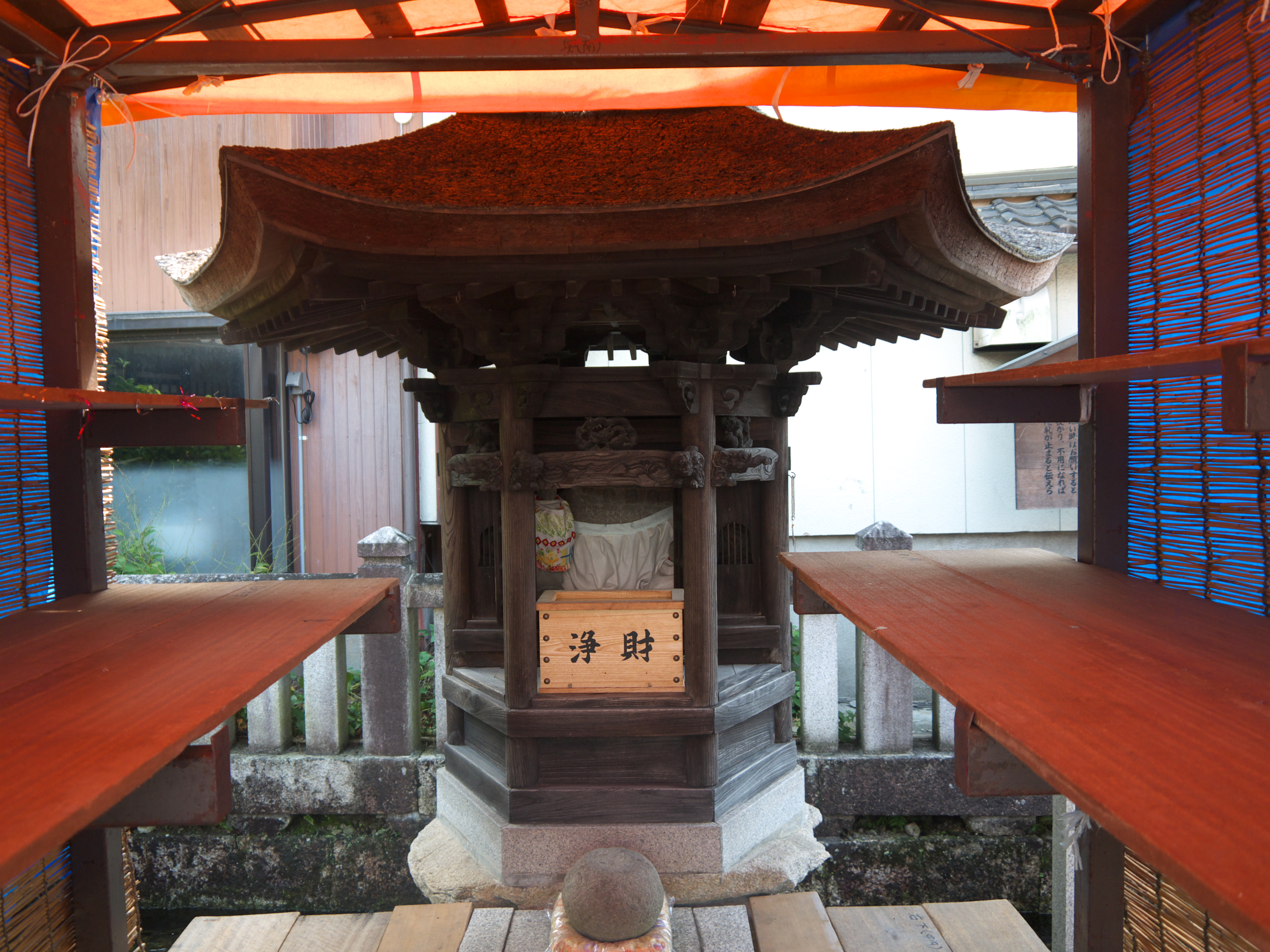 十王湧水地蔵祭り